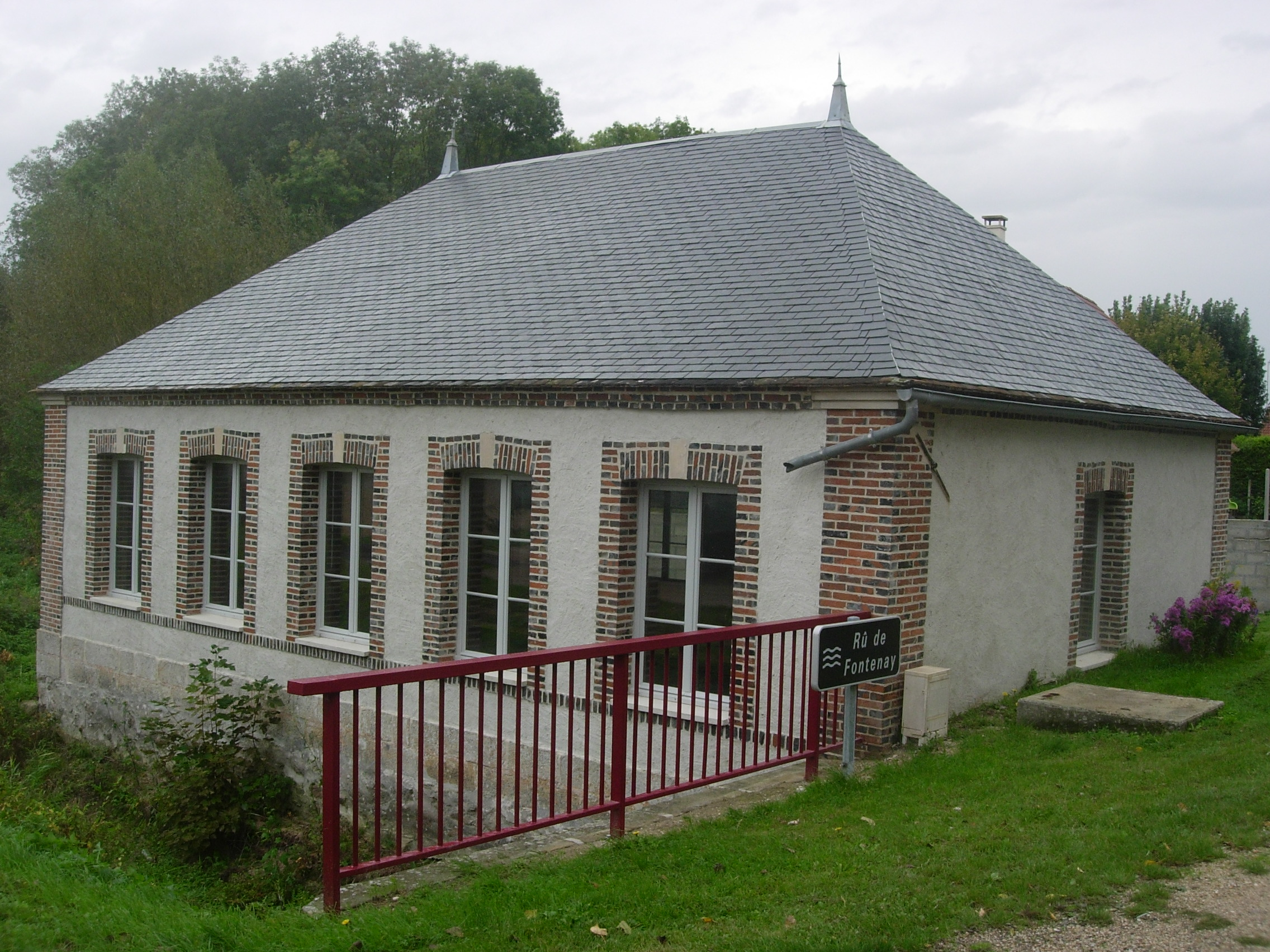 Lavoir de Gumery (Aube)